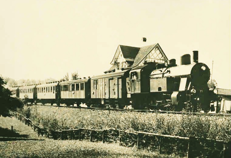 Zug der BT mit Eb 3/5 6, einem Post-/Gepäckwagen, einem Erst-/Zweitklasswagen und Wagen 3. Klasse in Muolen.